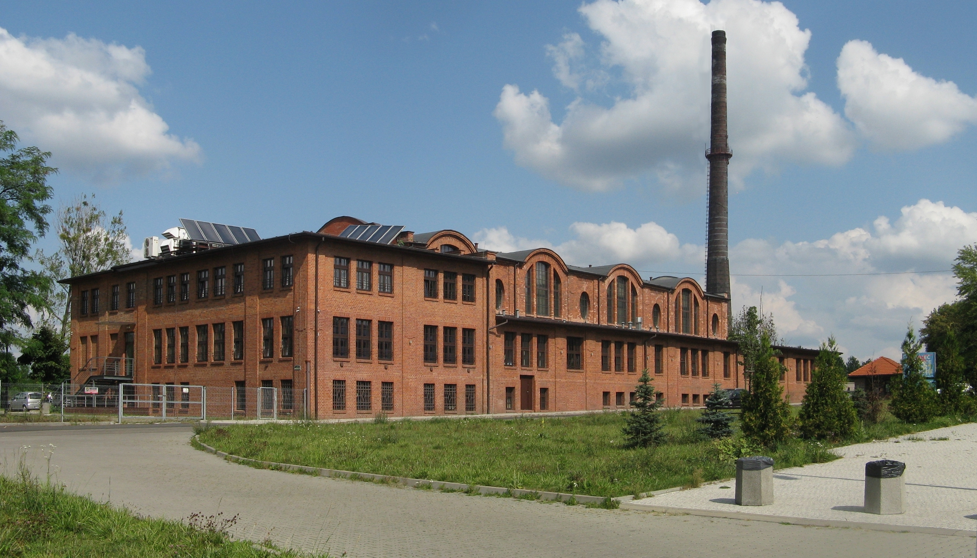 Cechownia kopalni węgla kamiennego Rozbark z 1911 roku w Bytomiu, ul. Wojciecha Kilara 29, zabytek nieruchomy.